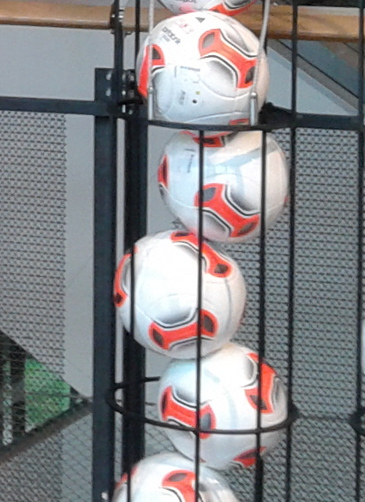 Bälle im Sportgeschäft Engelhorn sports in Mannheim, dabei Spalding, Nike, Derbystar, Adidas Torfabrik